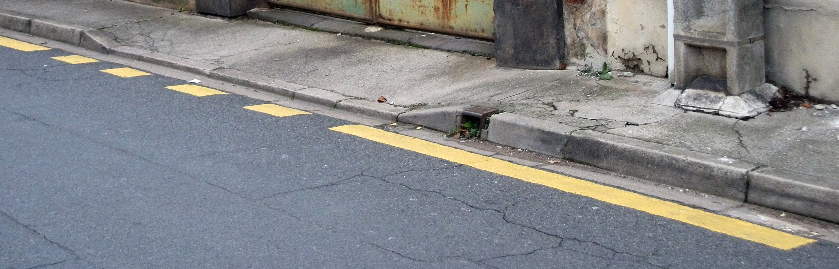 Rue Andreau, à Cusset, les marquages au sol réglementaires pour signifier l'interdiction du stationnement (à gauche) et de l'arrêt (à droite).